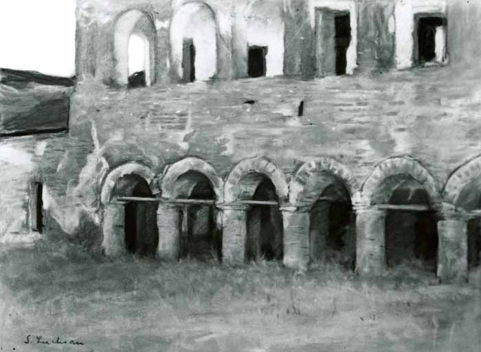 Ruinele de la Comana, Pastel pe pânză preparată; montată pe şasiu - Muzeul Naţional de Artă al României - BUCUREŞTI, ordin de clasare 2603/07.04.2003 - Tezaur, nr. inventar 25549/959. Lucrarea datează din perioada 1902 - 1903. Motivul a fost reluat din alt unghi într-o acuarelă datată 1903. În aceasta perioadă Luchian a facut diverse experimente plastice, folosind combinaţii de tehnici şi suporturi insolite. Pastelul înlocuia pictura în reprezentarile luate direct din natură, fiind preferat pentru rapiditate şi pentru posibilitatea pe care o oferea în redarea fenomenelor tranzitorii. Este o lucrare de maturitate, în care formele sunt lucrate direct în culoare. Calitatea pastelului accentueaza culorile plate şi efectul de atmosferă. Semnat stânga jos, cu negru: „Luchian”.